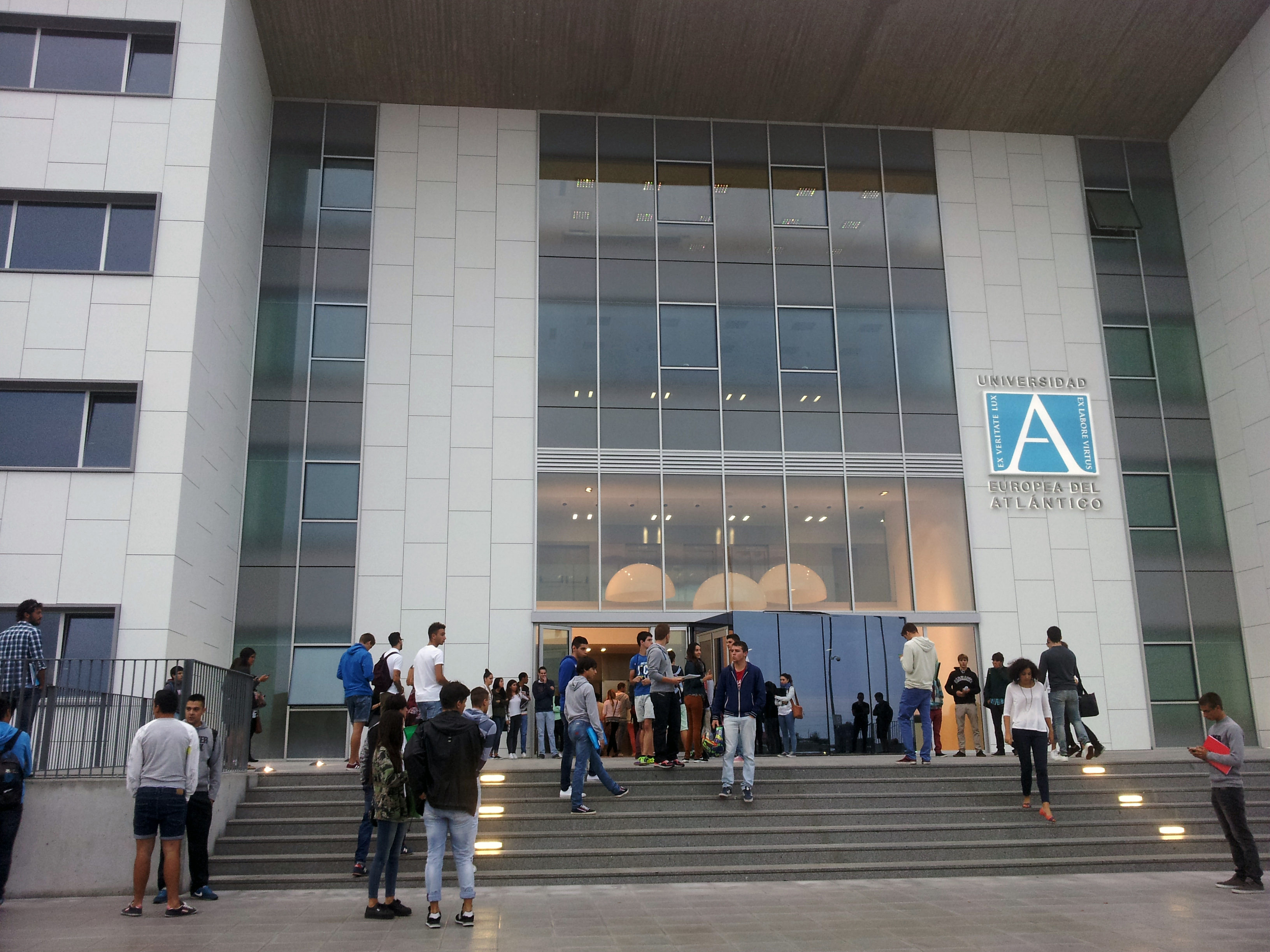 Fachada de UNEATLANTICO